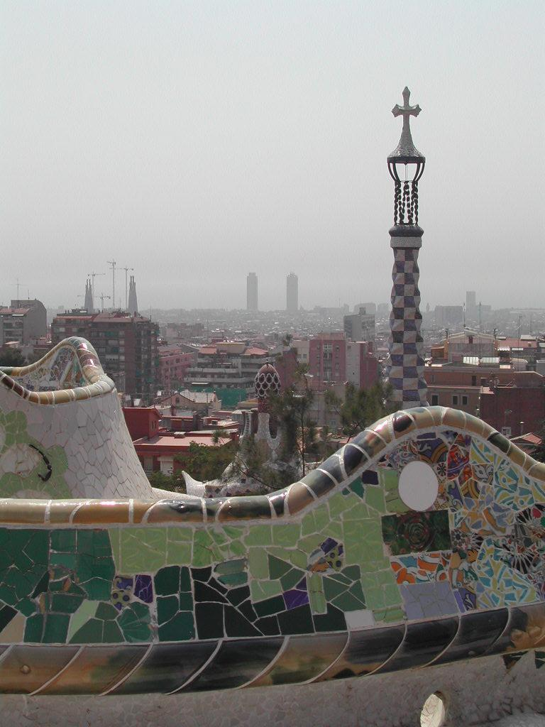 Parc Güell - Iwwerbléck